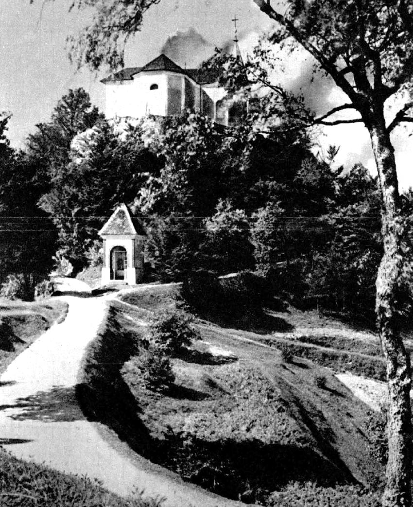 Sv. gora nad Litijo